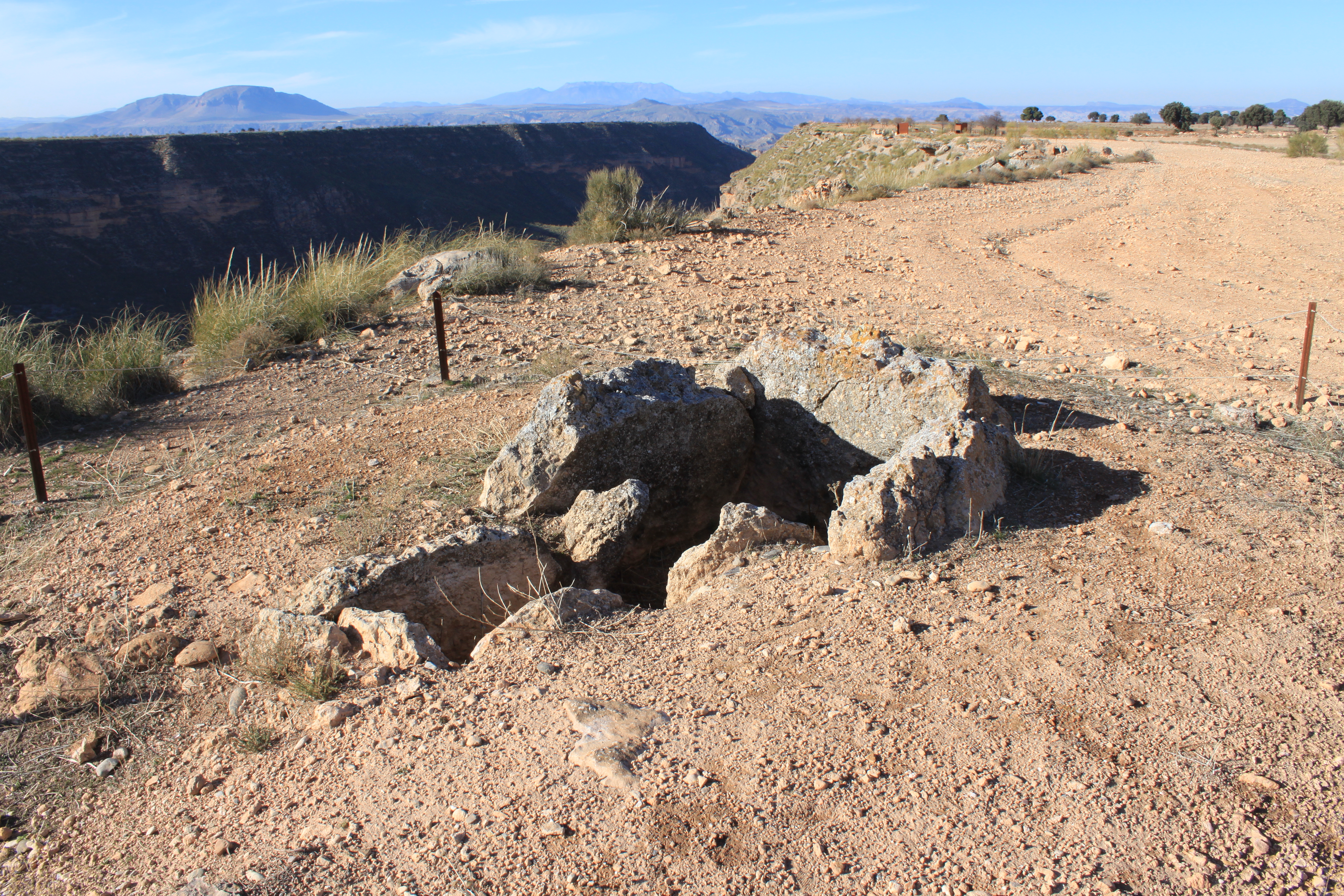 Dolmen 116 del Parque Megalítico de Gorafe situado en el Llano de Olivares. Gorafe, provincia de Granada, Andalucía, España.